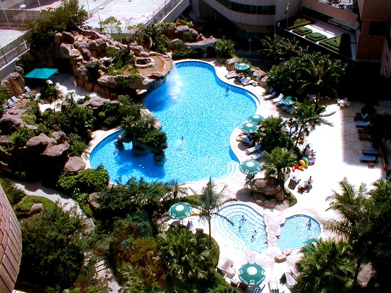 Hong Kong Parkview Swimming Pool 陽明山莊